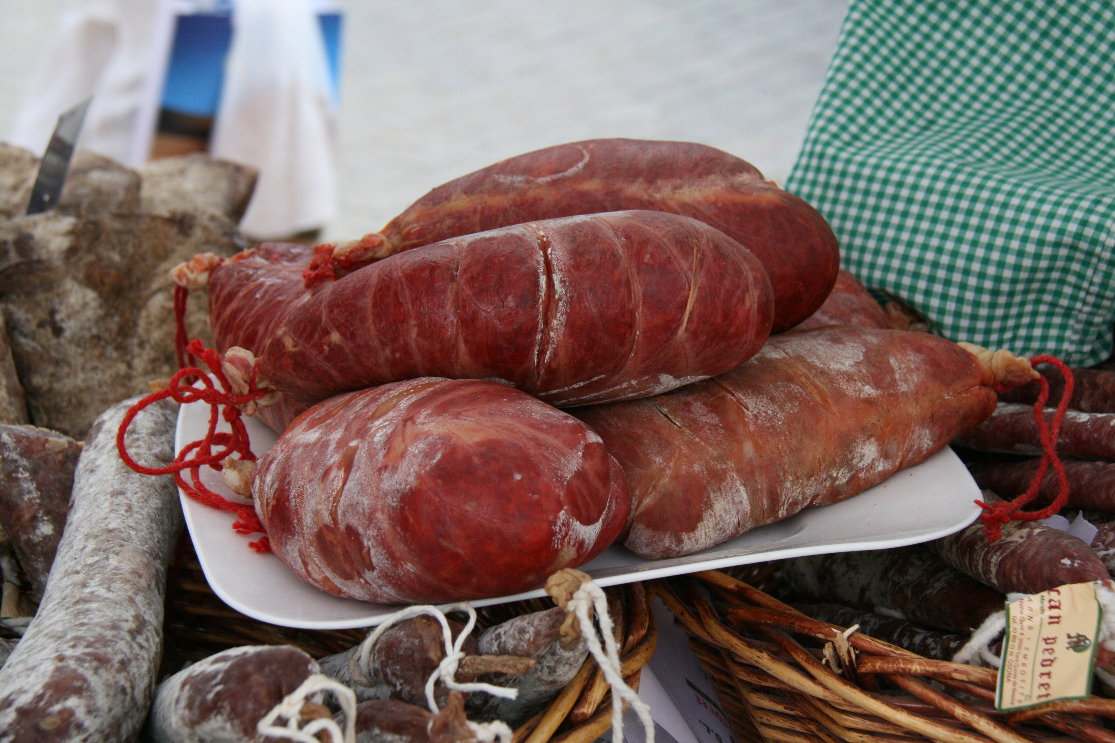 Botillos